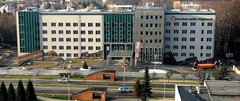 Siedziba Jastrzębskiej Spółki SA w Jastrzębiu-Zdroju